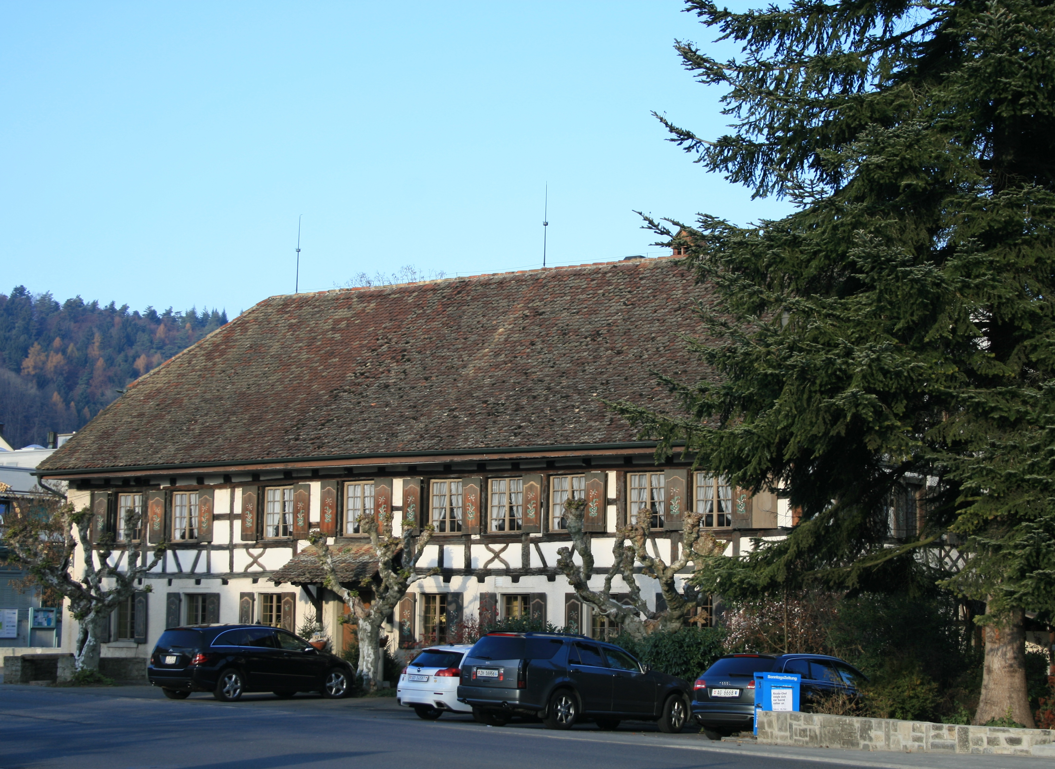 Riegelhaus (Gasthof Rössli) in Würenlos, erbaut um 1640